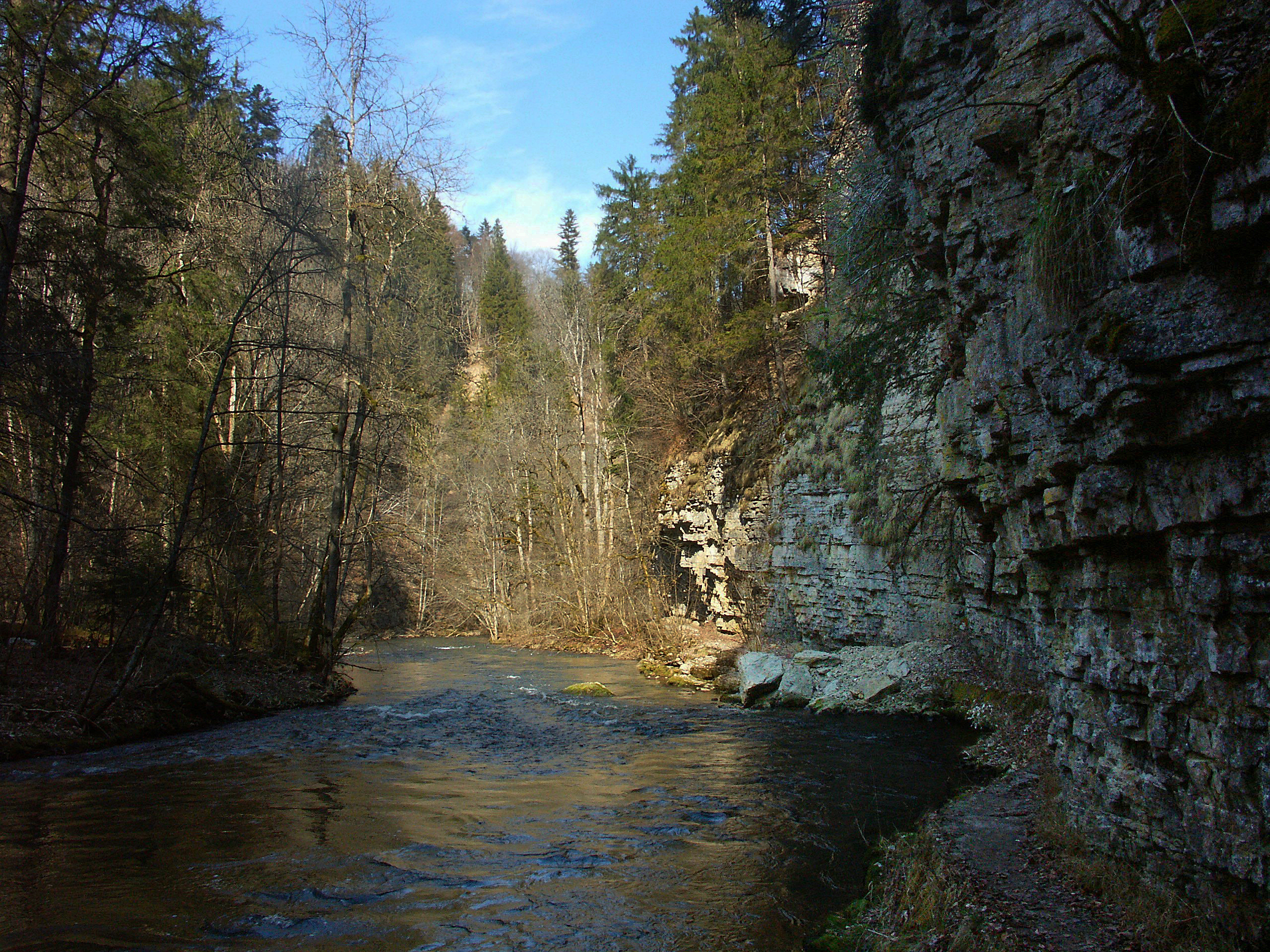 Wutachschlucht